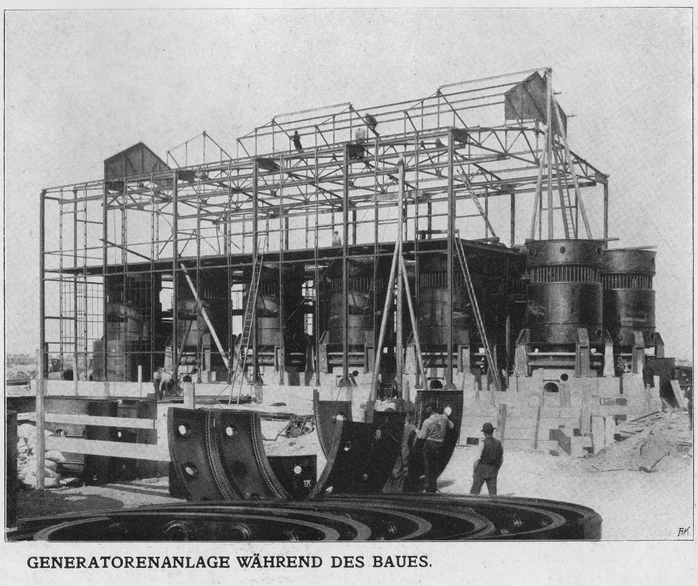 Städtische Gaswerk Leopoldau: Generatorenanlage während des Baues (1910)